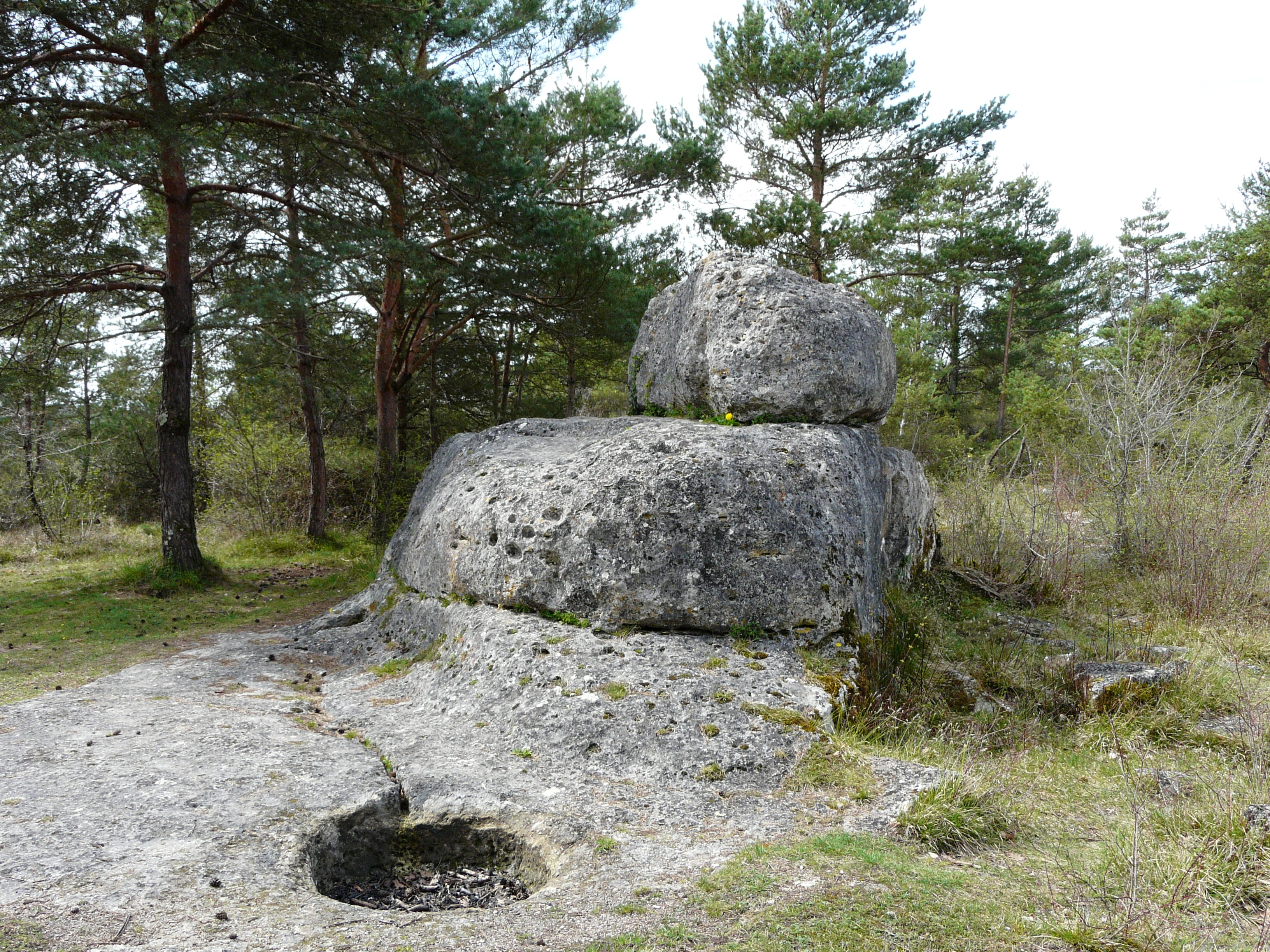 La Peyre d'Ermale, Paussac-et-Saint-Vivien, Dordogne, France. Au premier plan, une vasque et sa rigole d'alimentation, creusées dans la roche.